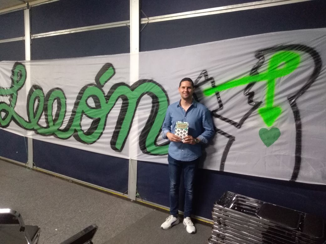 Feria del libro León 2018 trapo Leeón